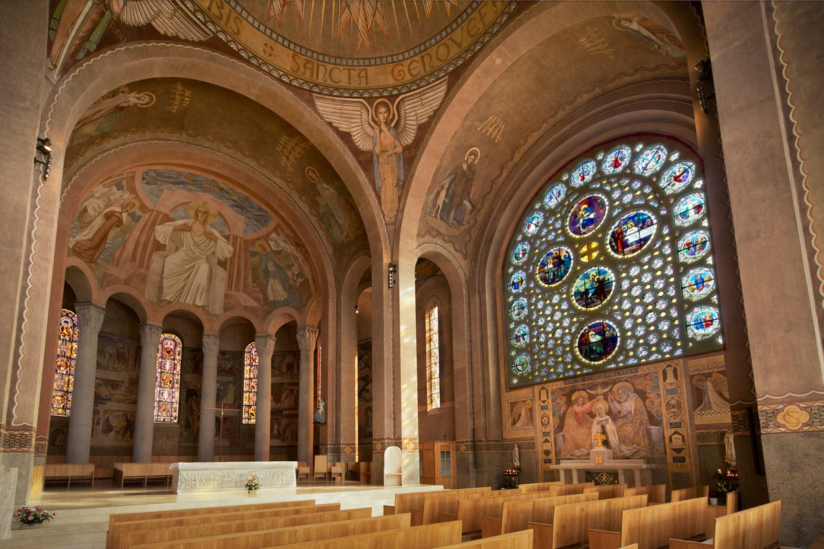 photo Benoît GUEUDET